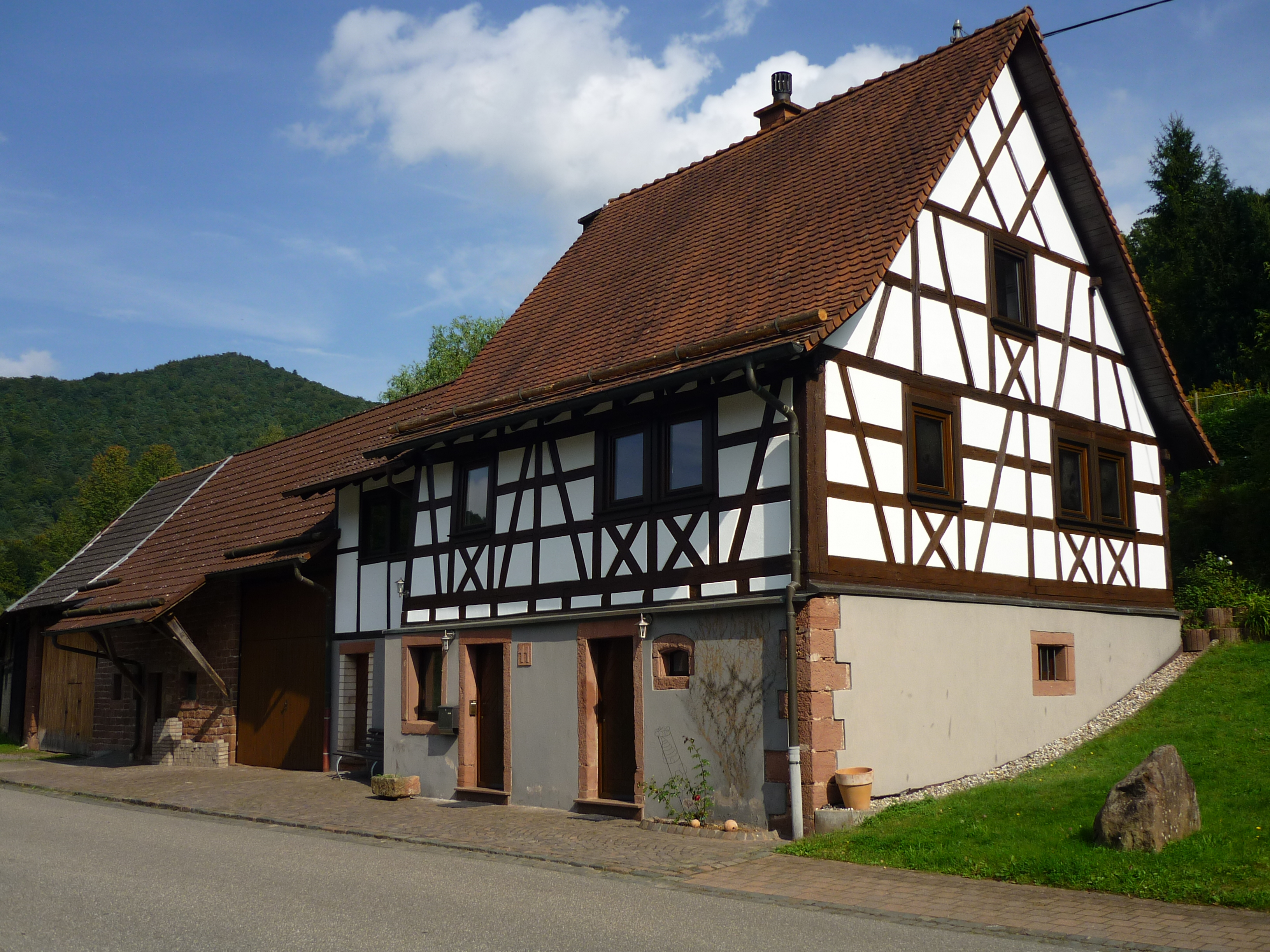 Fachwerkhaus Haupstr. 11 in Hirschthal (Pfalz)